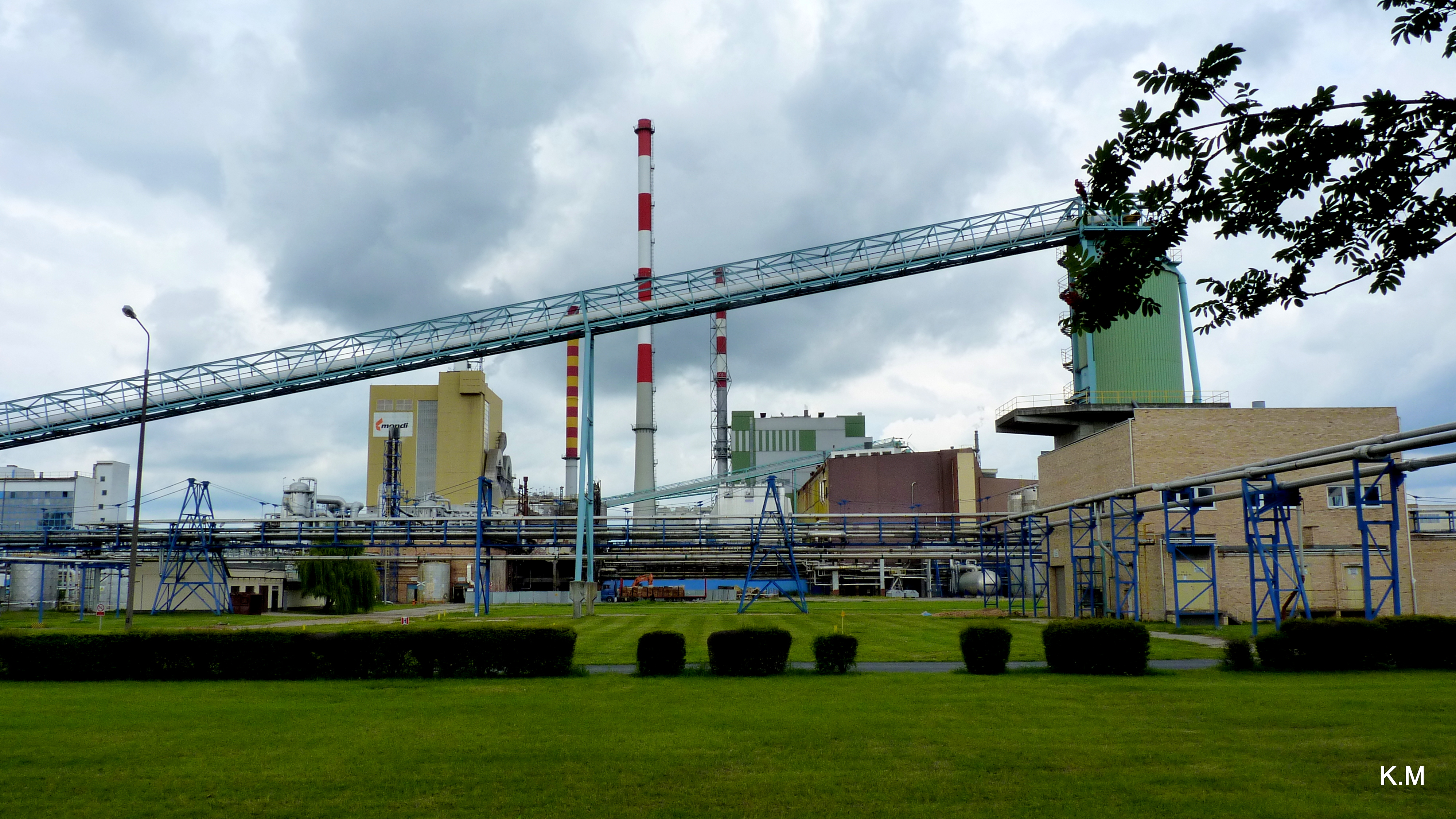 Świecie - Zakłady Papiernicze.